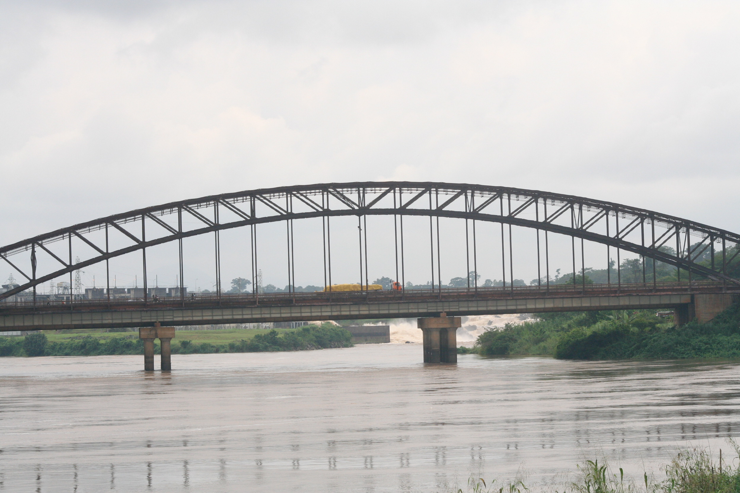 Pont allemand enjambant la Sanaga, à l'entrée d'Edea. Le barrage de la société d'aluminium ALUCAM, est en arrière plan.